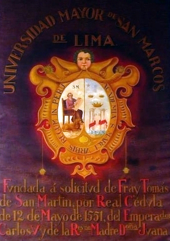 Óleo referente a la fundación de la Universidad de San Marcos, en 1551, siendo la primera universidad "oficial" (por pase regio) de América y por su continuidad la más antigua América.